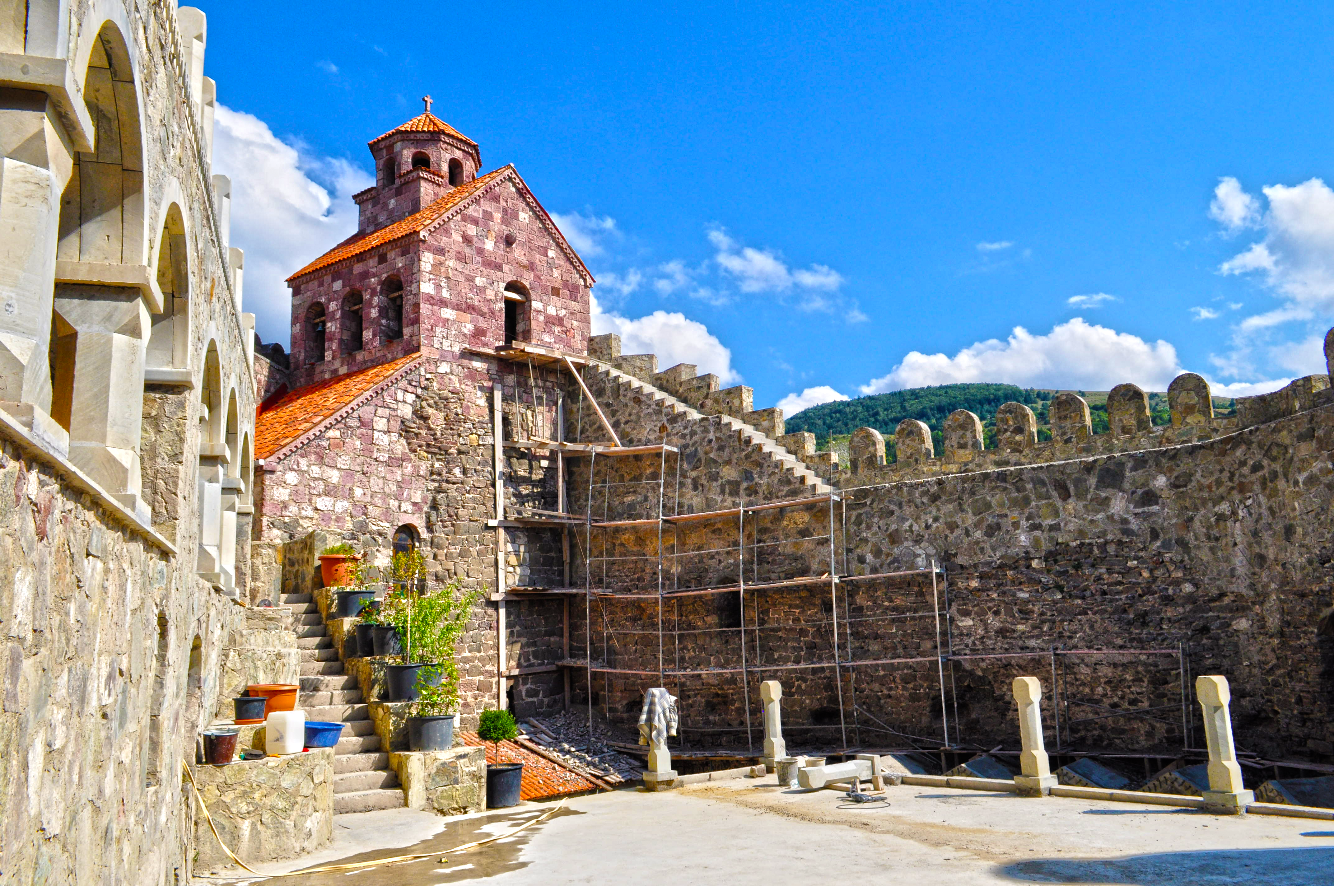 მძოვრეთის ციხე